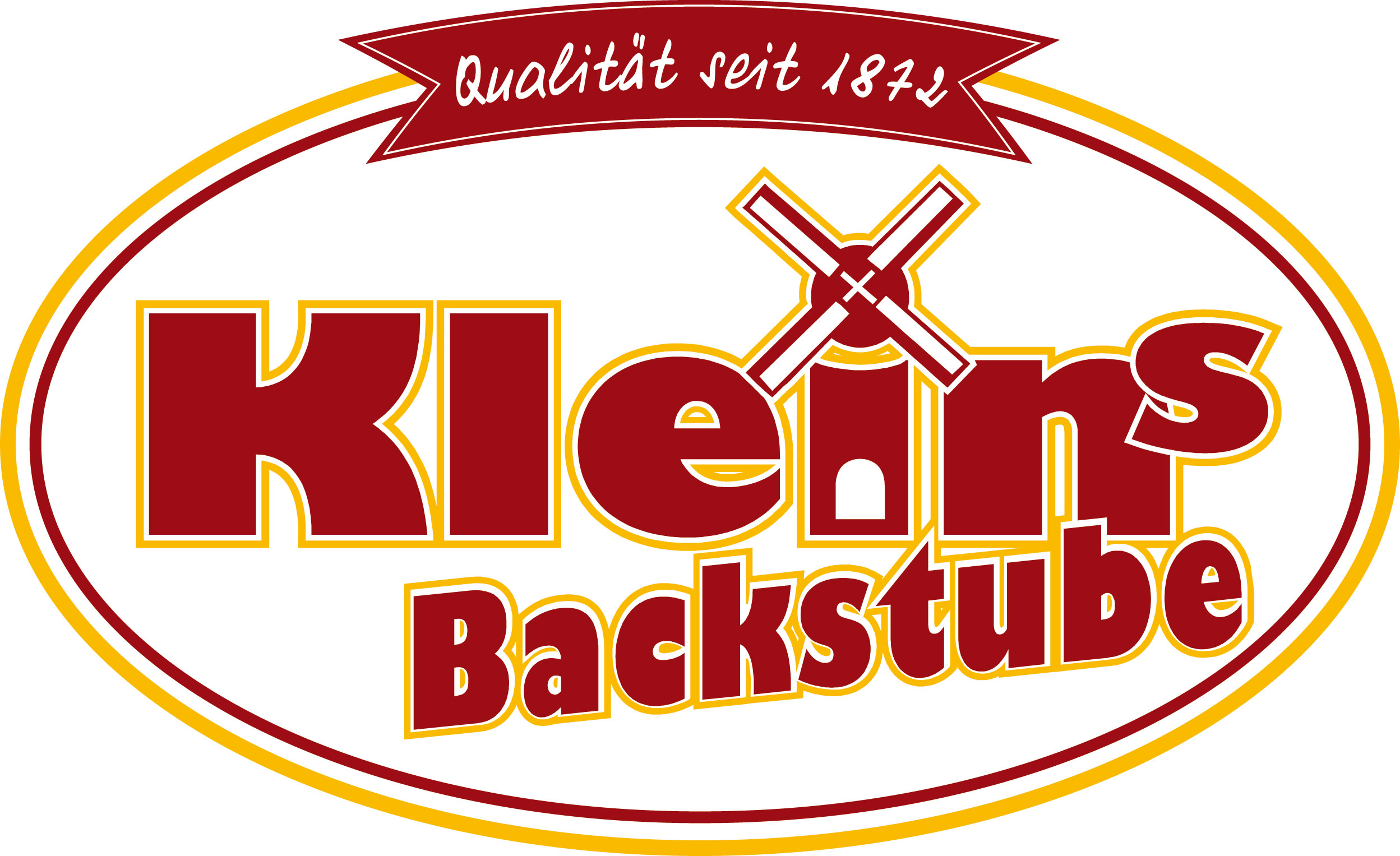 Logo der Stadtbäckerei Klein aus Hürth